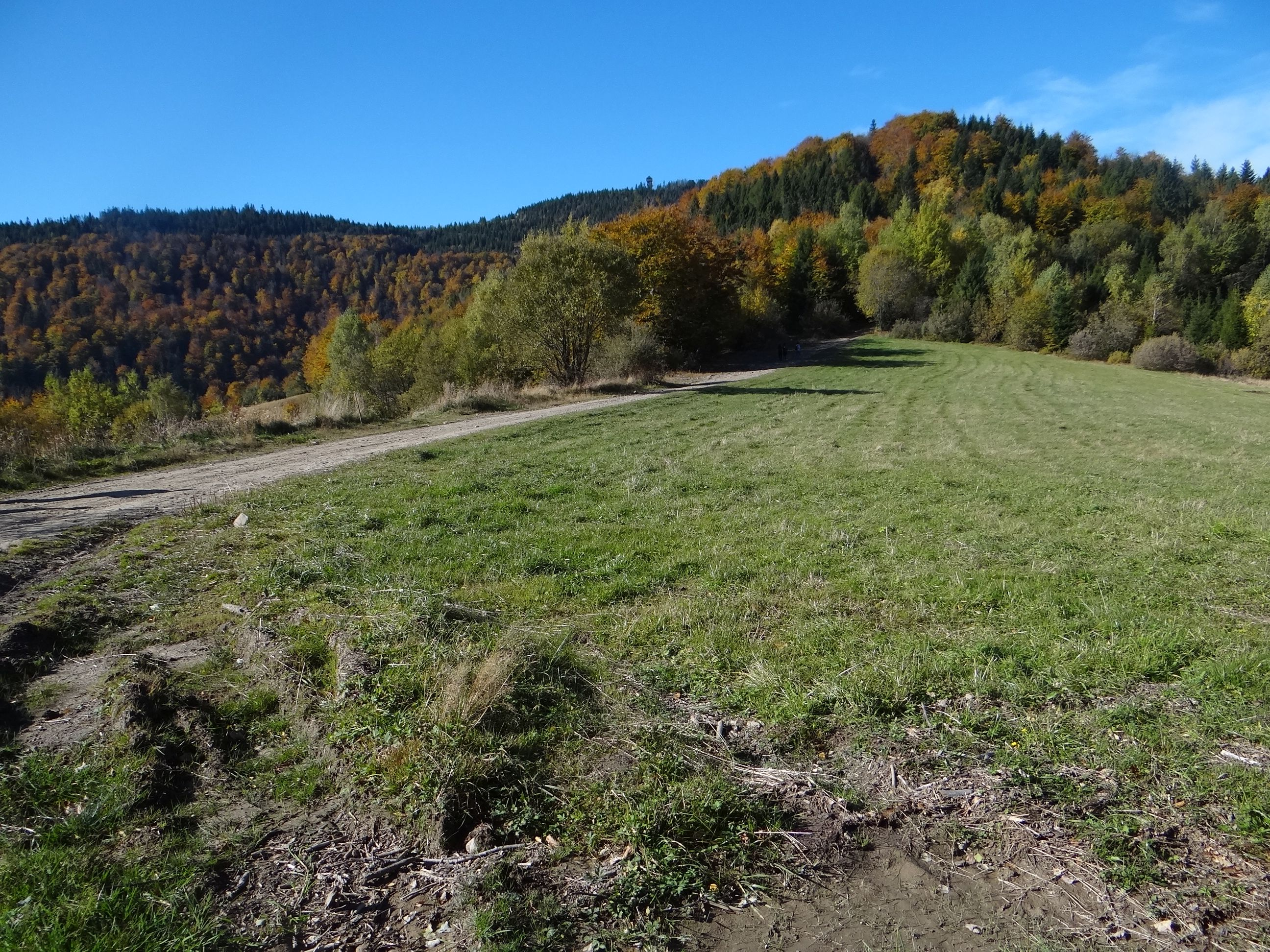 Gorc i Bystrzaniec